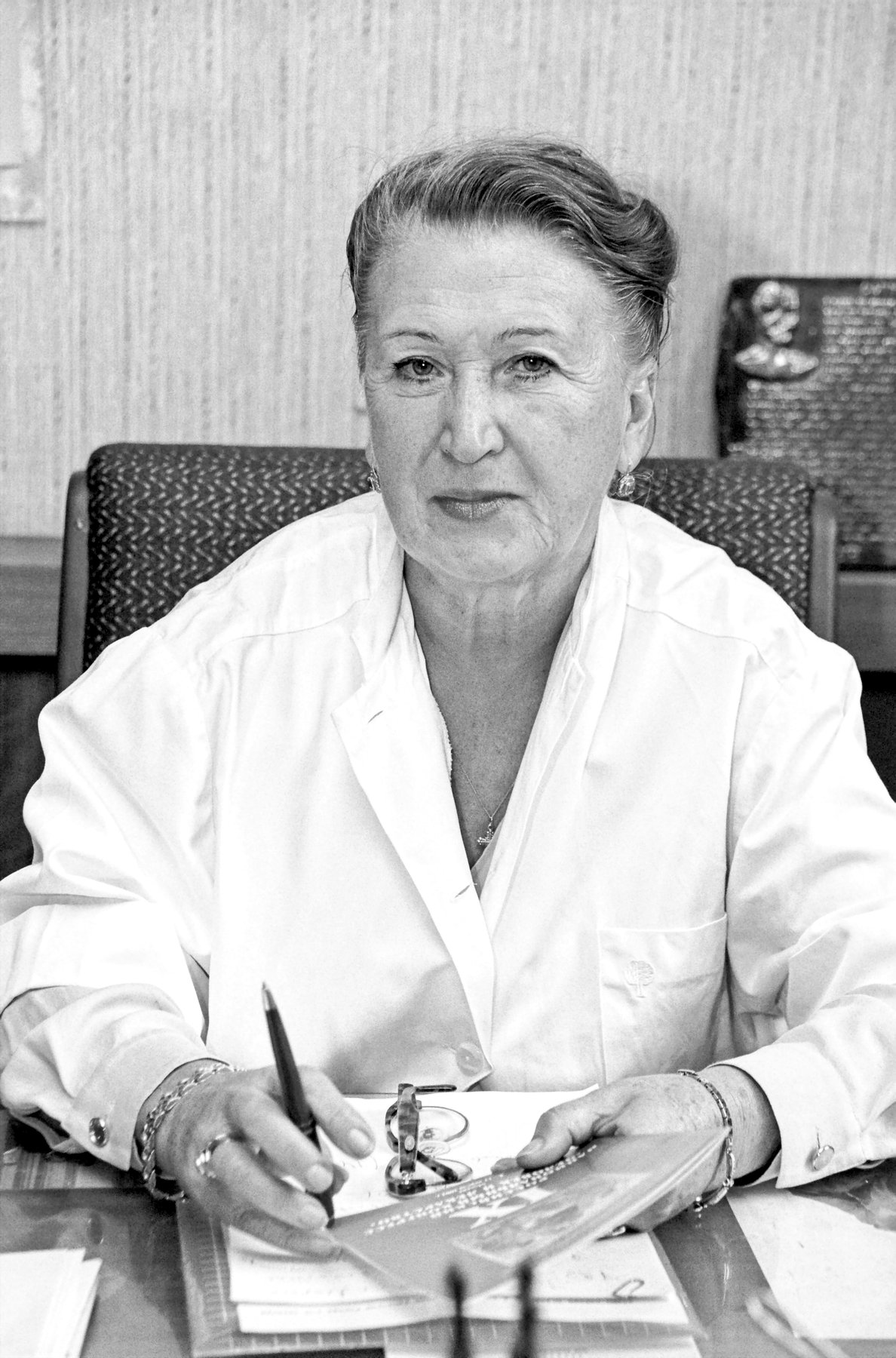 Элана Константиновна Яненко (17.11.1932) — доктор медицинских наук (1980), профессор (1990), заместитель директора НИИ урологии.